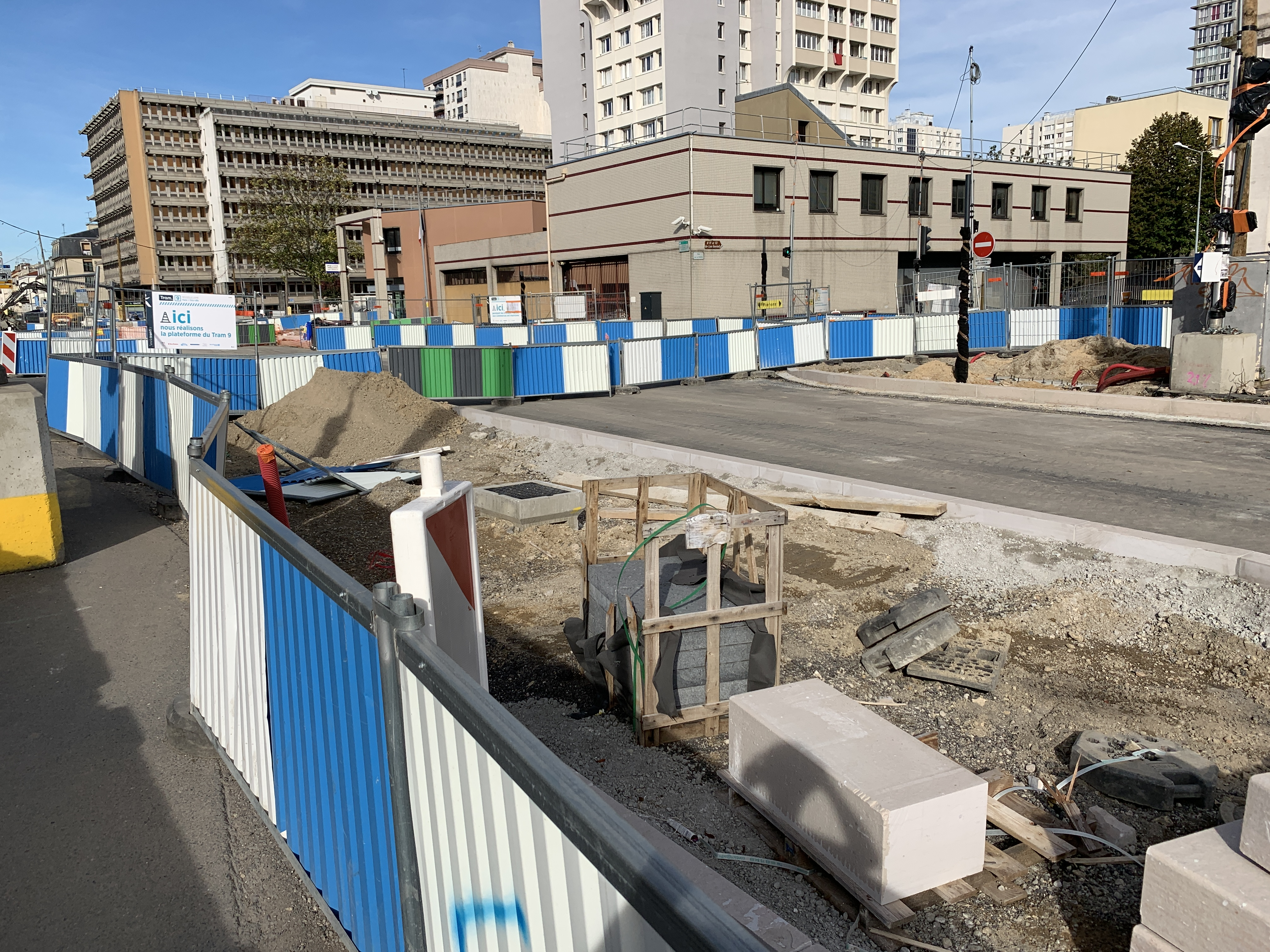 Travaux préparatoires pour la ligne 9 du tramway d'Île-de-France, avenue Léon Gourdault, Choisy-le-Roi.